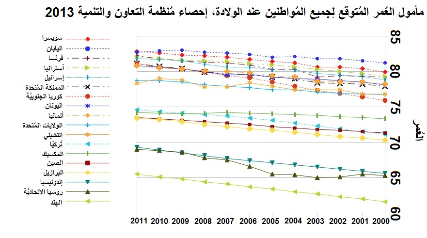 رسمٌ بيانيٌّ يُظهرُ مأمول الحياة لِجميع السُكَّان عند الولادة، بدايةً من سنة 2000م إلى سنة 2011م، وذلك في سويسرا مُقارنةً مع عدَّة دُول أُخرى.